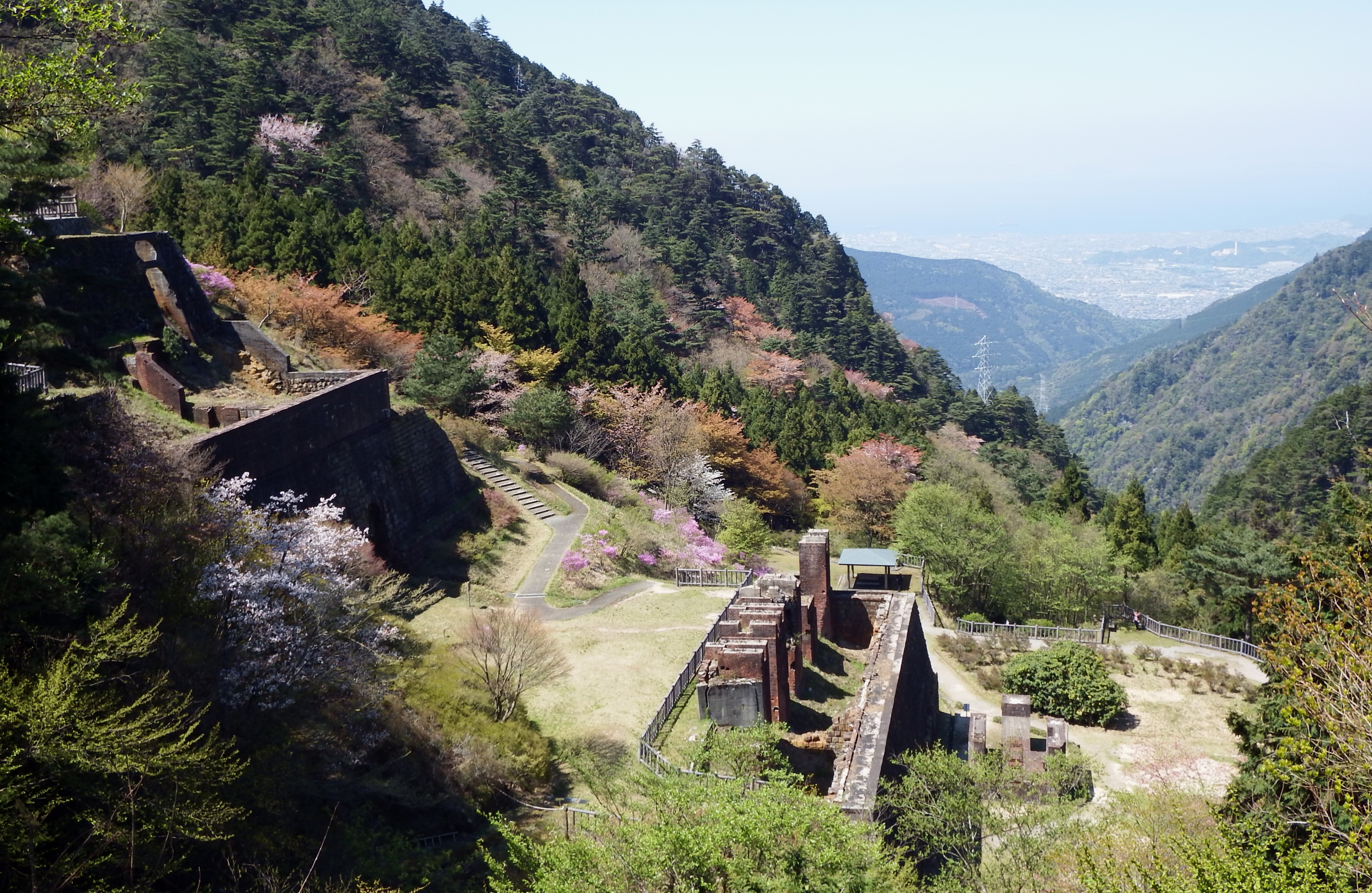 新居浜市の東平より市街地を臨む